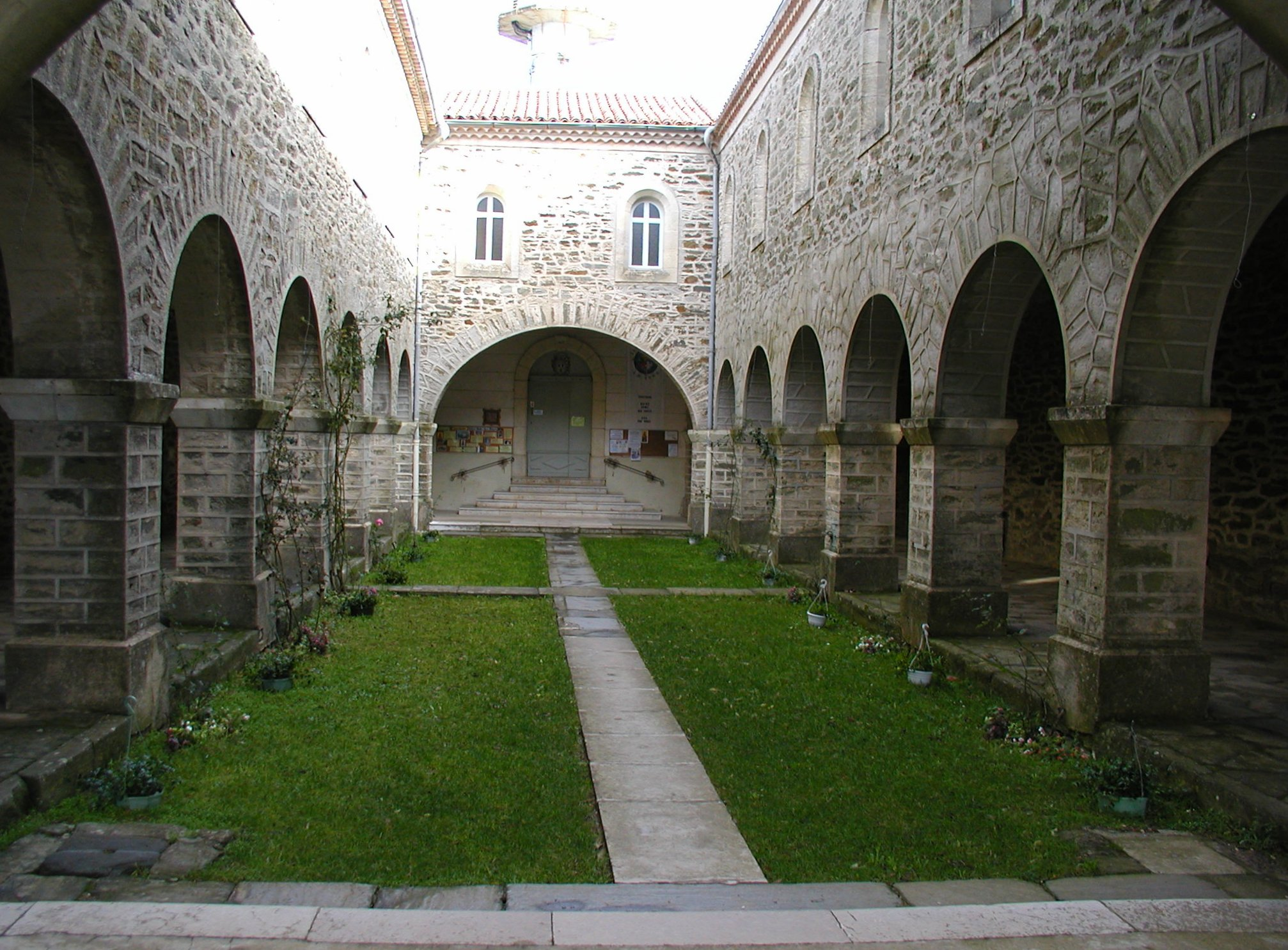 Pignans, Var (France) - Notre Dame des Anges - Cloître (Cloister)